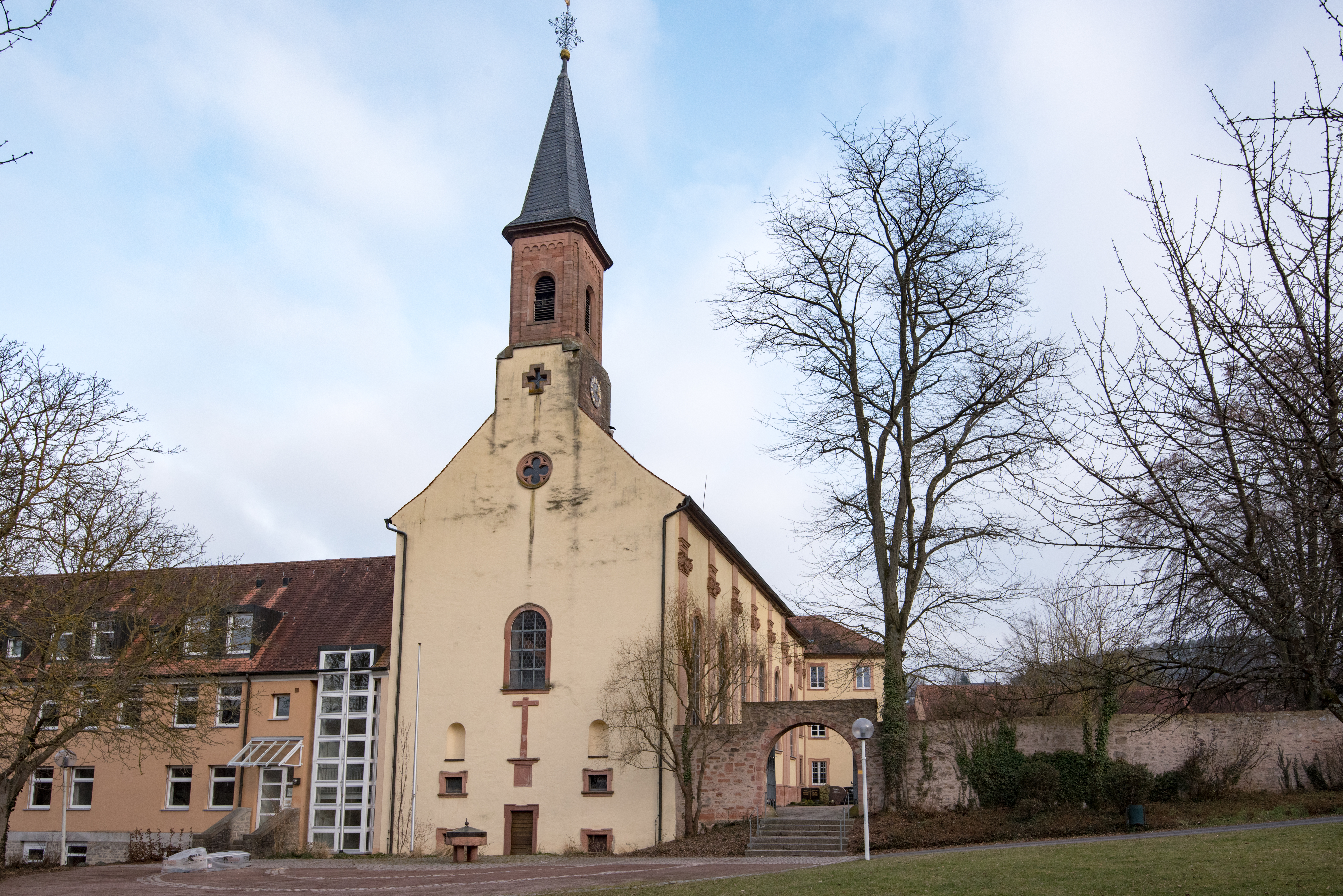 Hösbach, Kloster Schmerlenbach, Kirche